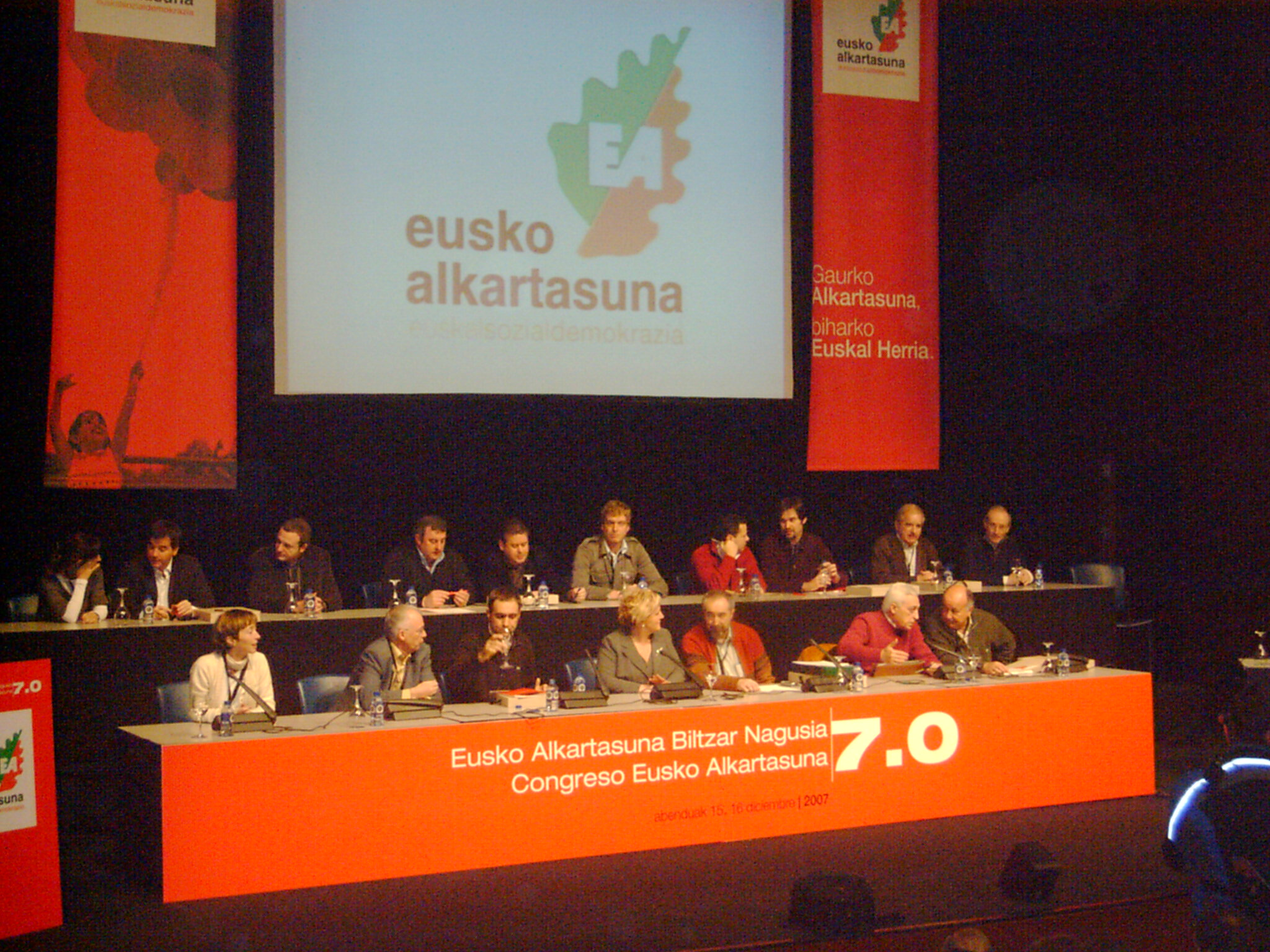 Cynhadledd Eusko Alkartasuna, 2007.